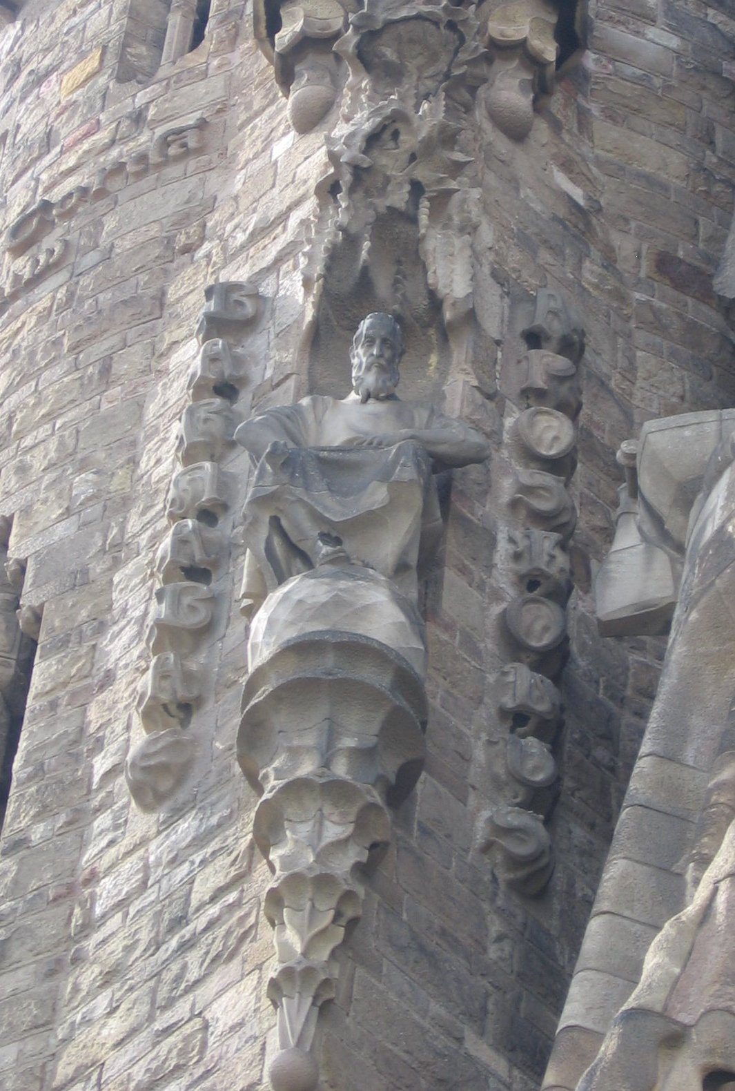 Estatua de San Bernabé, Fachada del Nacimiento, Sagrada Familia, Barcelona